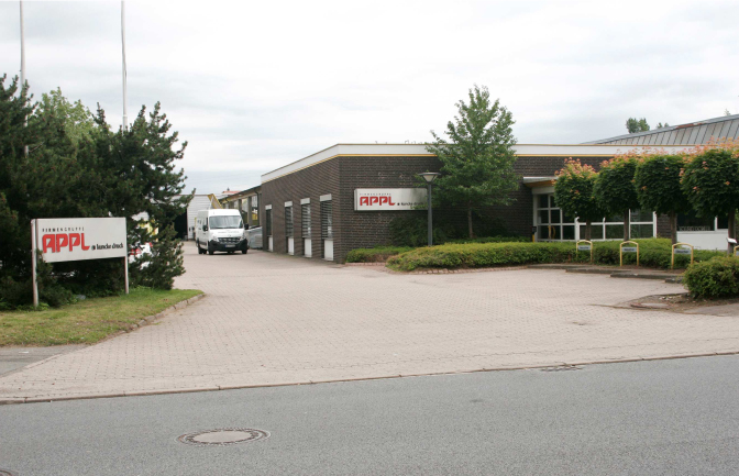 Kuncke druck in Ahrensburg